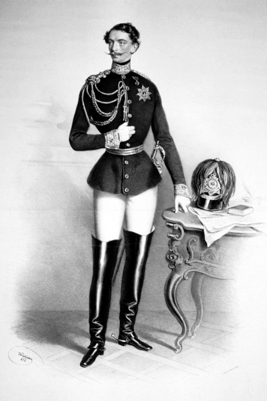 Karl III. (Parma), Herzog von Parma (1823 Florenz-1854 Parma), Lithographie von Josef Kriehuber, 1852. Ferdinand Karl war der einzige Sohn des Herzog Karl II. Ludwig von Parma (1799−1883) und seiner Gattin Prinzessin Maria Theresia (1803−1879), Tochter des König Viktor Emanuel I. von Sardinien-Piemont und dessen Gattin Maria von Modena. Nachdem sein Vater zu seinen Gunsten abdankte, kehrte er aus London im August 1849 unter dem Schutz österreichischer Truppen nach Parma zurück und errichtete ein reaktionäres Willkürregime, das ihn derart verhasst machte, dass er im März 1854 in Parma auf offener Straße von einem Unbekannten erdolcht wurde.